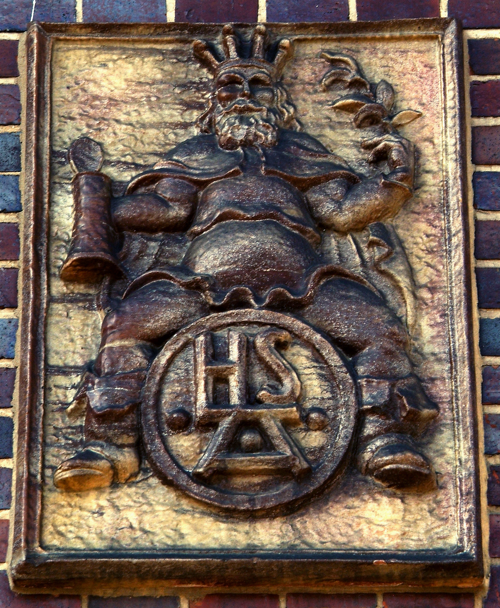 Wappen der Brauerei Hermann Scheele mit den Initialen "H S A" am Gebäude Am Tiergarten 2 in Anderten ...